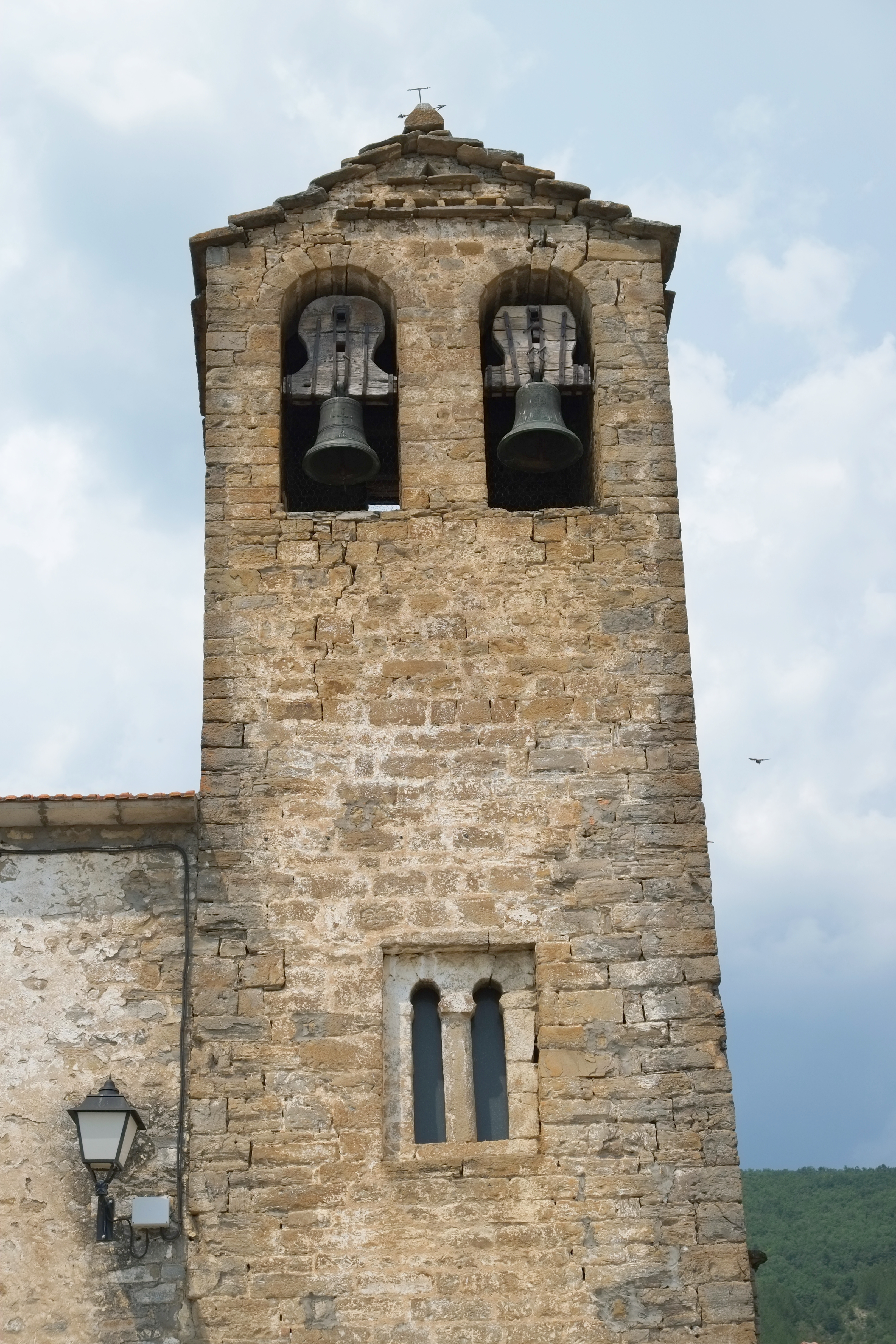 Pfarrkirche San Adrián in Guasillo in der Provinz Huesca in Aragonien (Spanien)